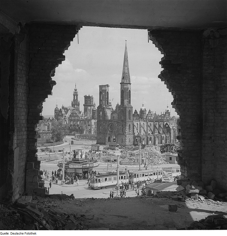 Original image description from the Deutsche FotothekBlick aus einer Ruine über die Straßenbahnhaltestellen gegen die zerstörte Sophienkirche